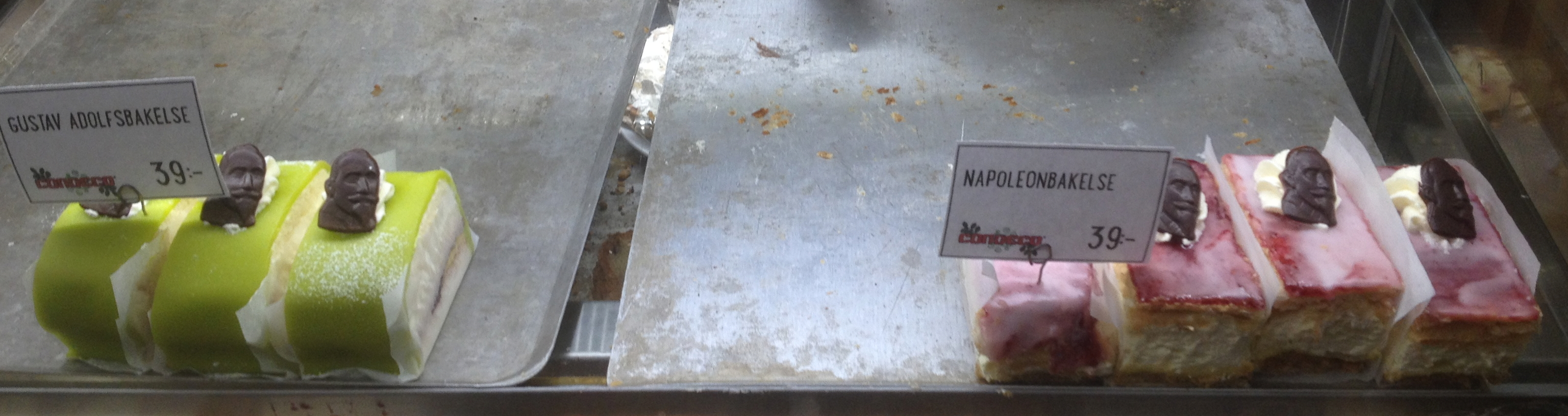 Gustav Adolfsbakelser och napoleonbakelser på göteborgskt kafé (Condeco). Notera "chokladkungen" som pryder båda bakverksvarianterna.